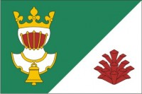 Sudovo Hlavno (okres Praha-východ)